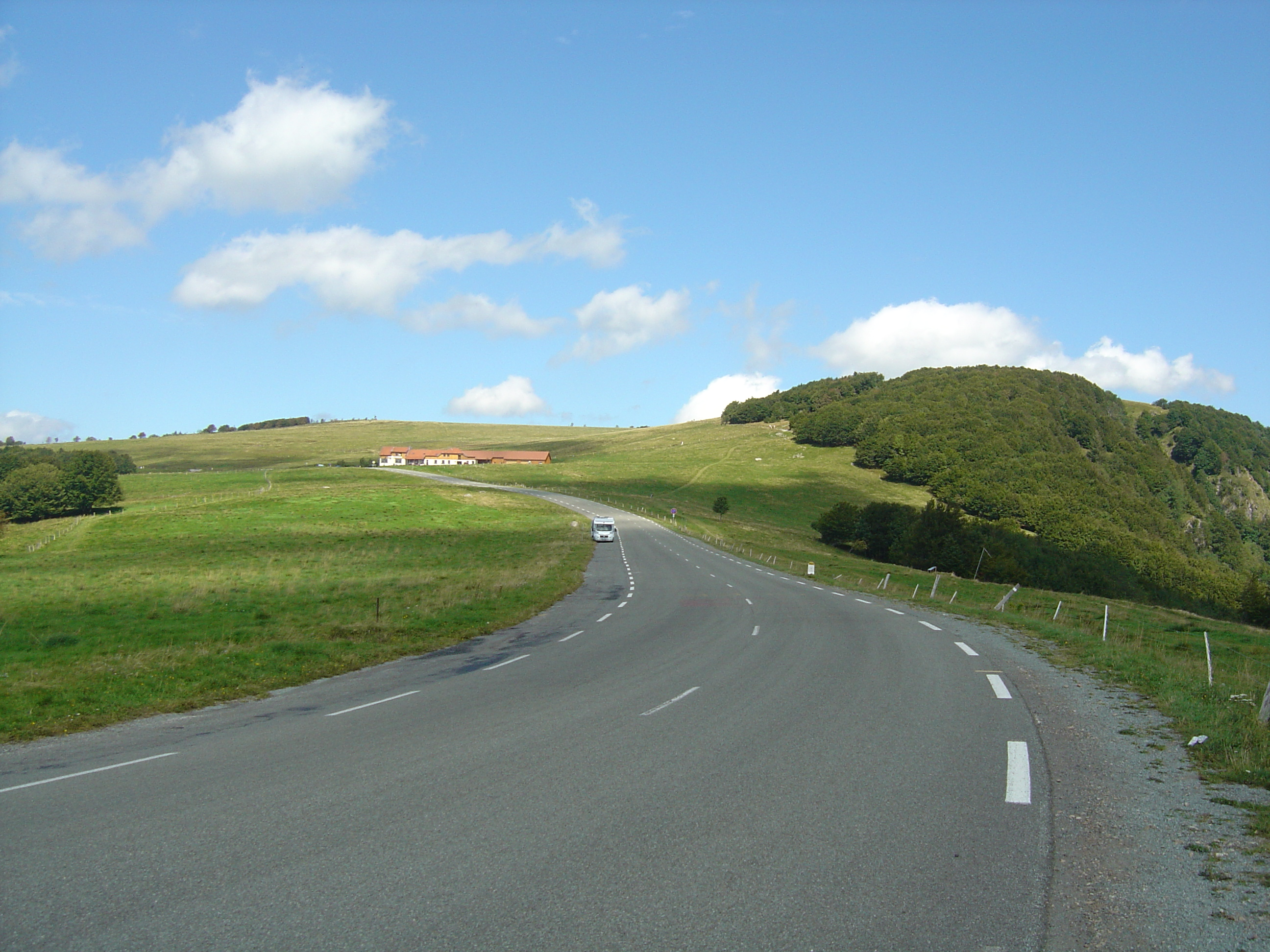 A quelques hectomètres du Ballon d'Alsace (arrivée par les routes de Giromagny et Sewen)